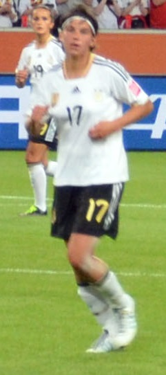 WM Vorrundenspiel zwischen Frankreich und Deutschland am 5. Juli 2011 im Borussiapark in Mönchengladbach; Ariane Hingst